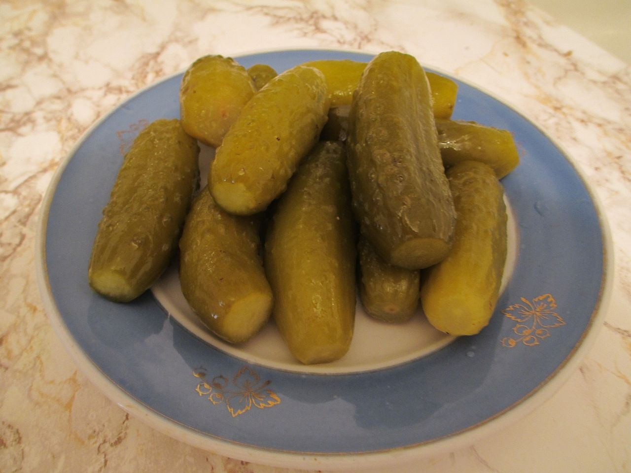 Cetrioli in salamoia